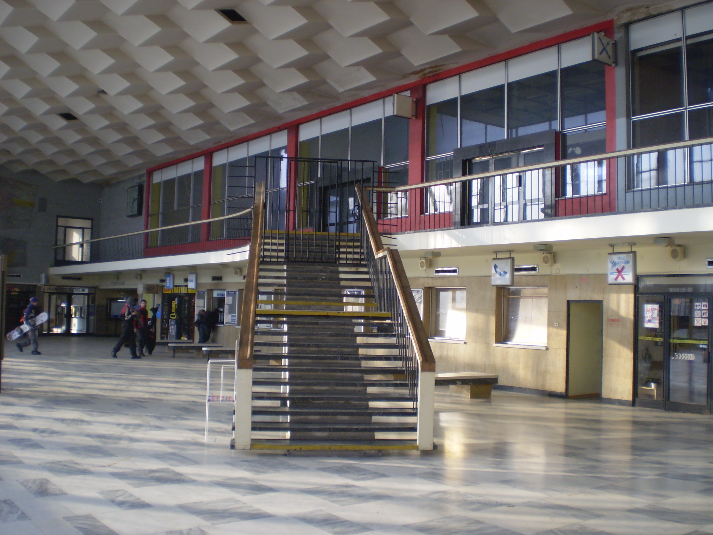 Hala vlakového nádraží v Havířově.